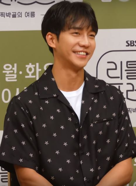 12일 오후 서울시 양천구 목동 SBS에서 SBS 월화 예능 ‘리틀 포레스트’ 제작발표회가 열려 배우 이승기, 이서진, 정소민, 개그우먼 박나래가 참석해 기자와의 질의 응답시간을 갖고 있다.